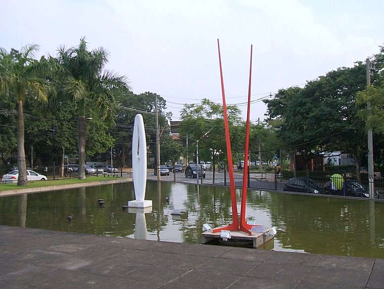 Obras no Museu Brasileiro da Escultura (MuBE), em São Paulo.